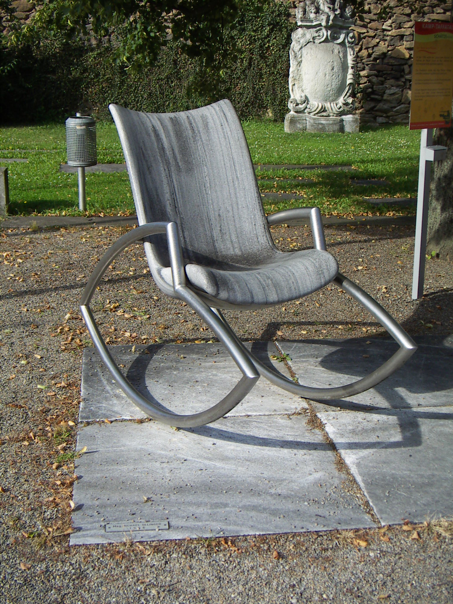 Kunst am Bau, Objekt: Sessel beim Museum, Künstler Michael Öllinger, 1996, Material: Wachauer Marmor und Edelstahl, im Vorhof des Höbarthmuseums, nicht nur zum anschauen, kann auch benutzt werden.